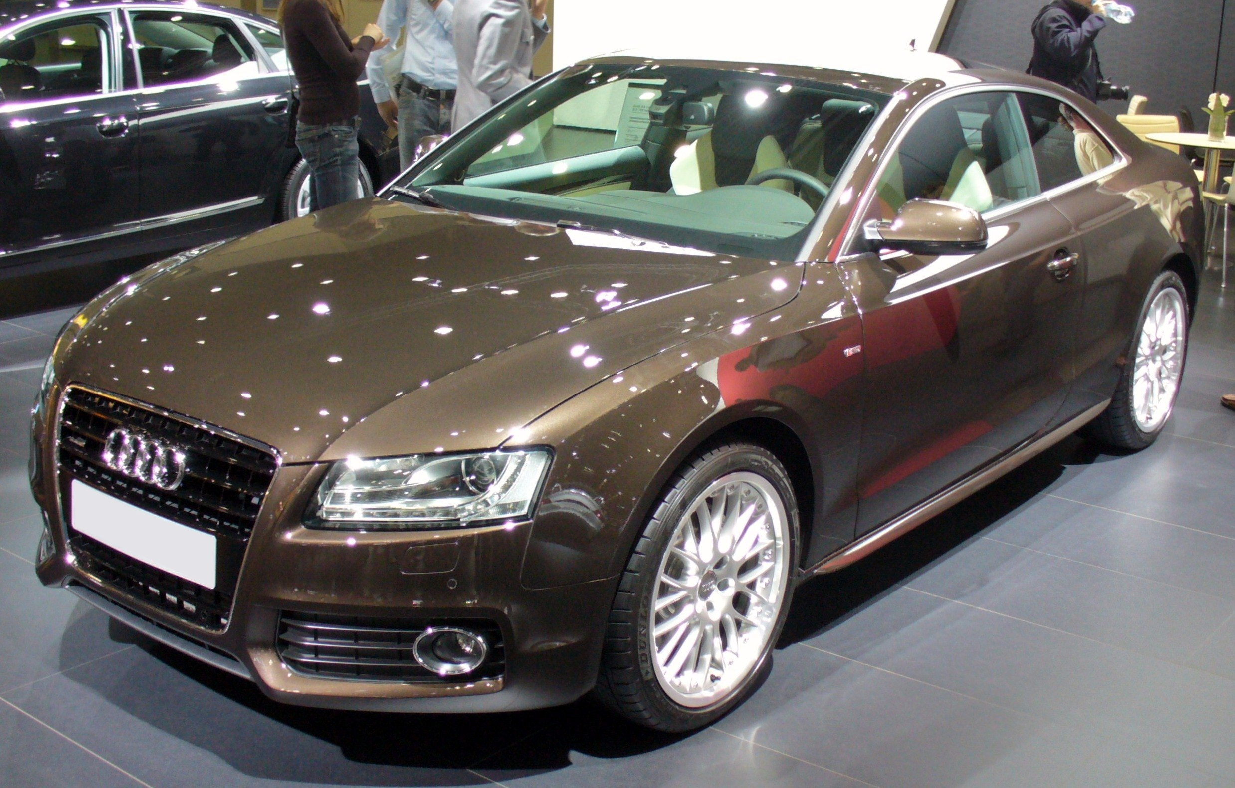 Audi A5